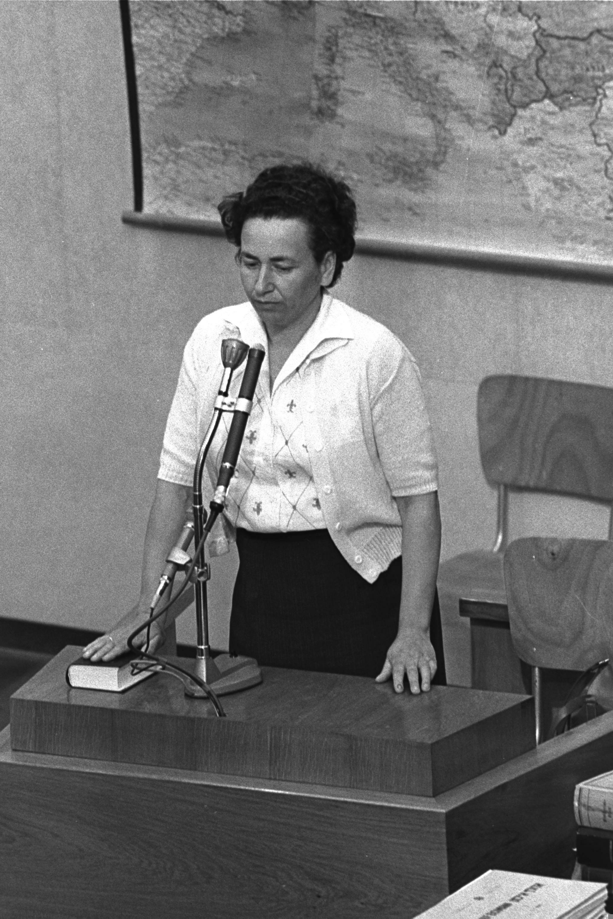 הלה שיפר רופאייזן במשפט אייכמן